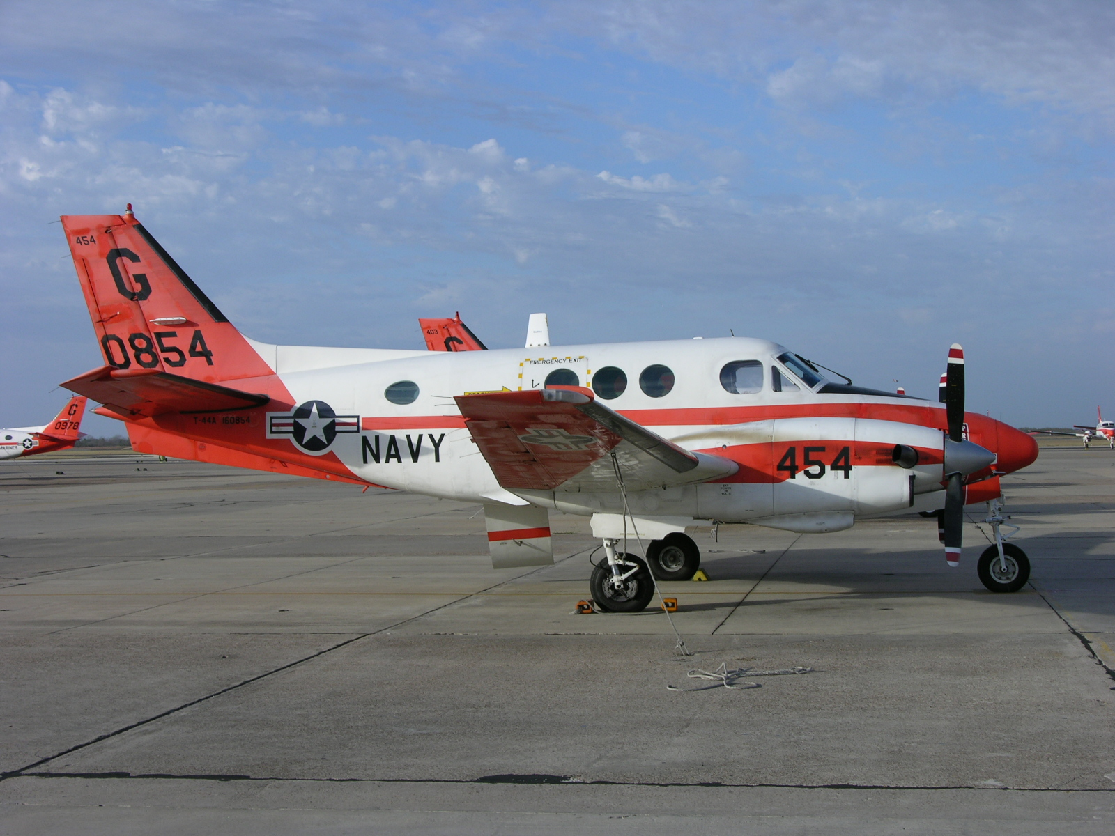 Beechcraft T-44A US Navy